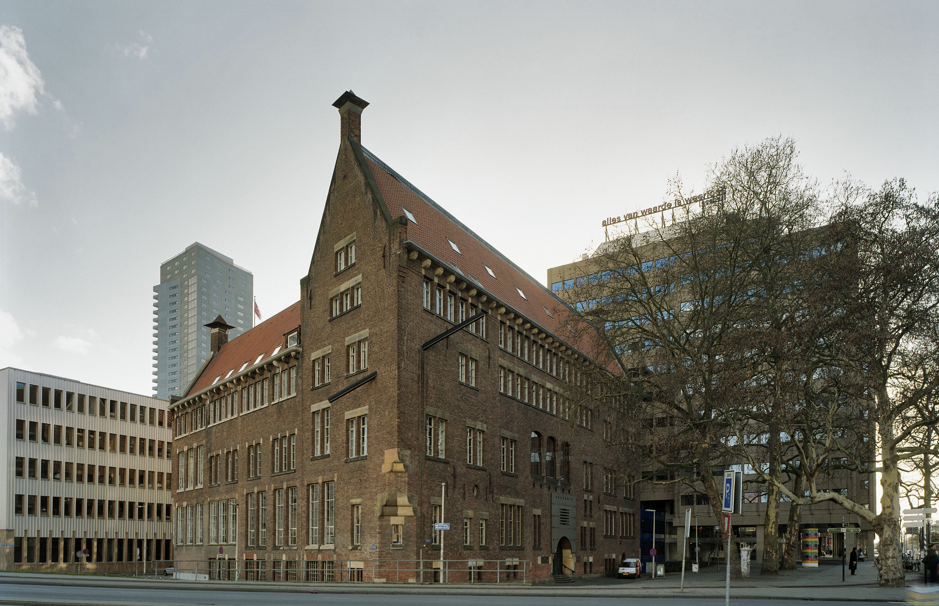 Willem de Kooning Academie: Overzicht rechterzijgevel